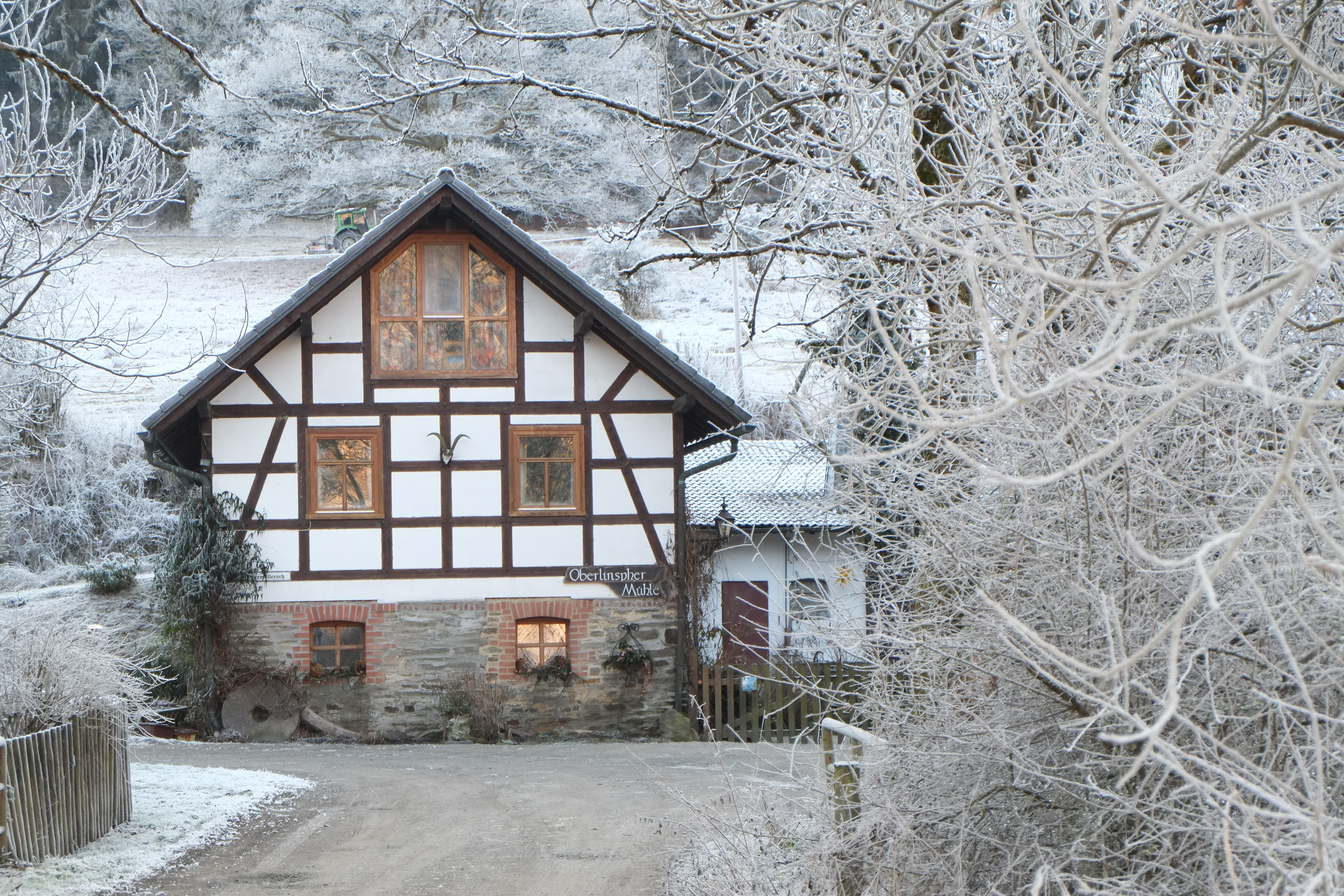 Oberlinspher Mühle in Bromskirchen (Hessen, Deutschland) im Winter